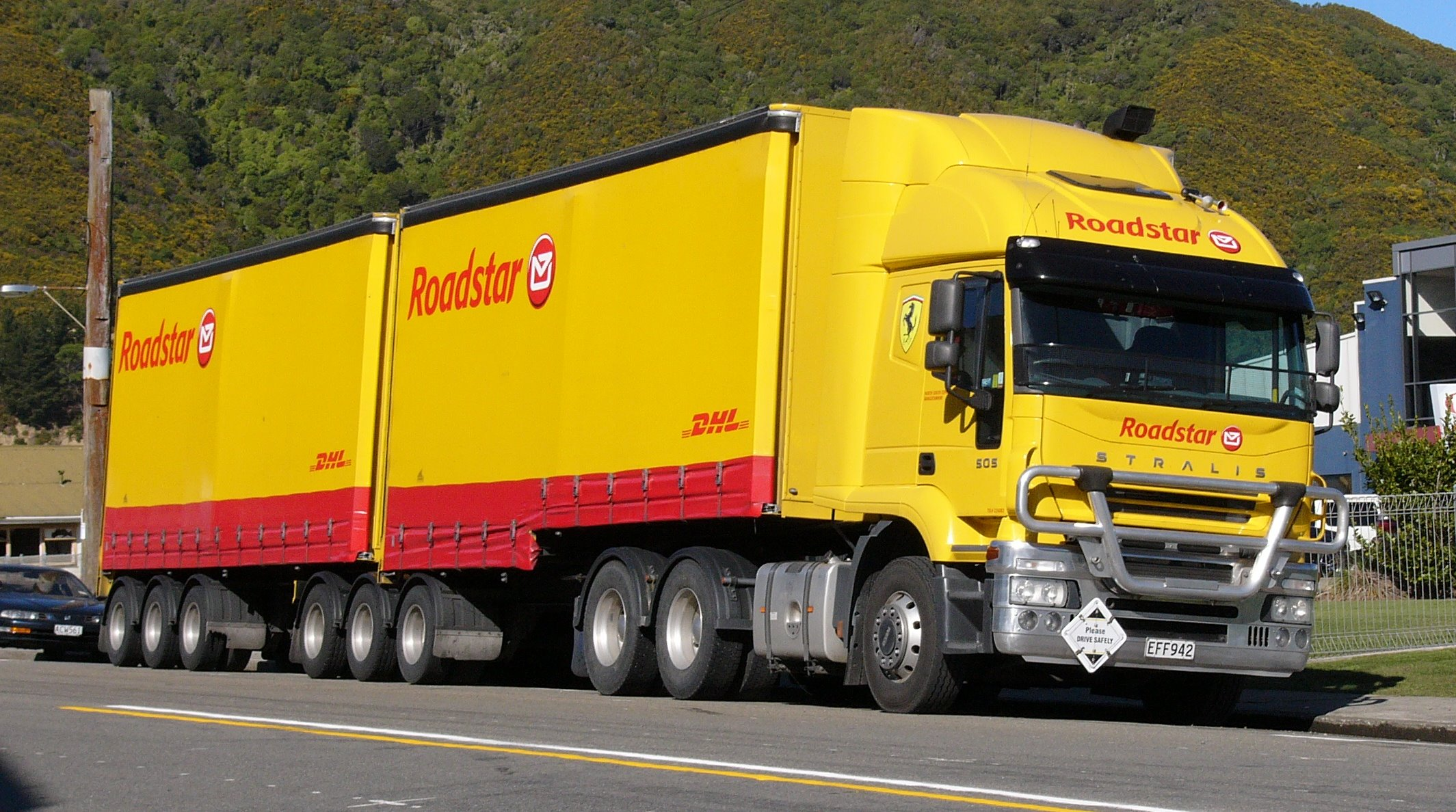 2007 Iveco Stralis